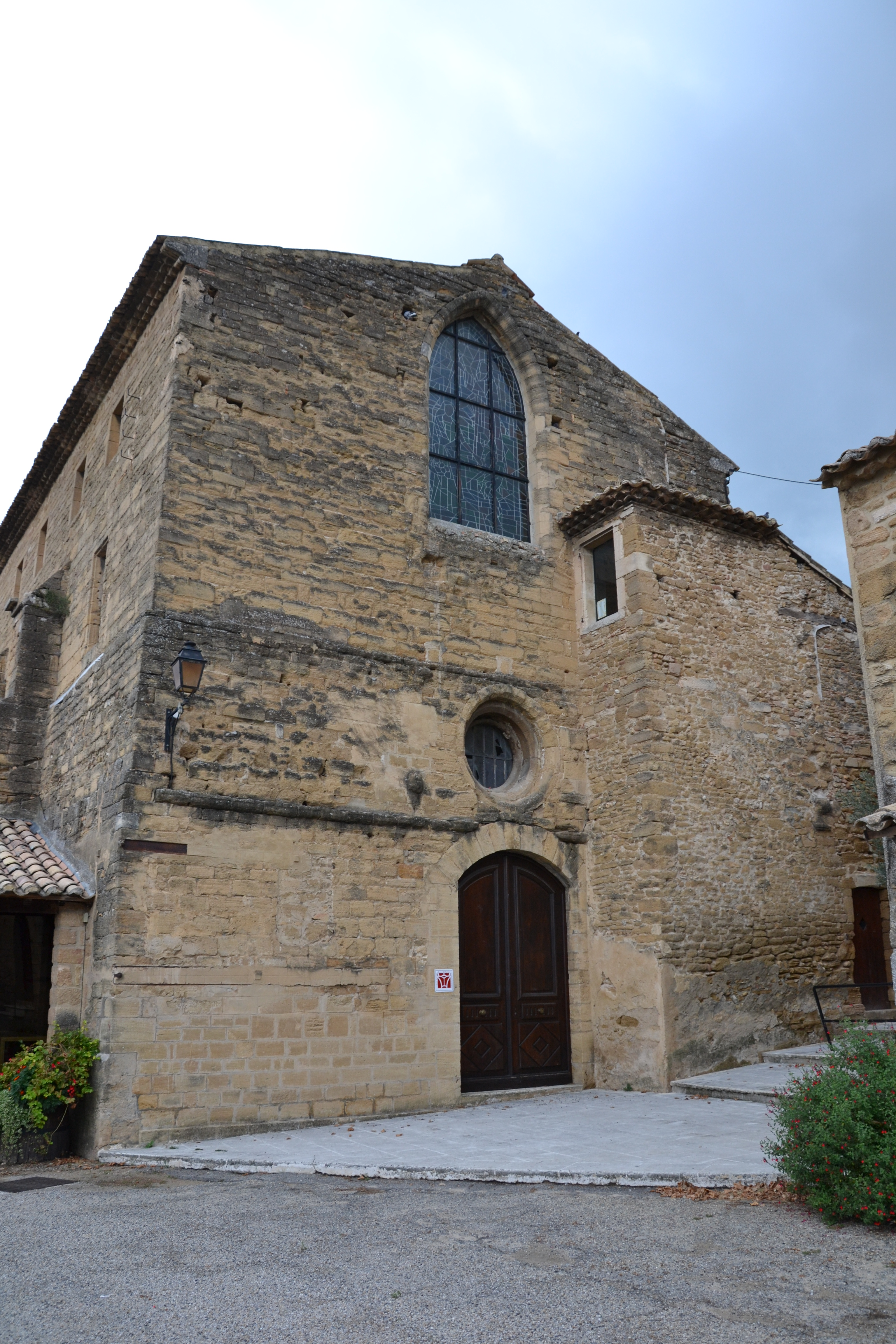 Abbaye de Bouchet (Inscription) .